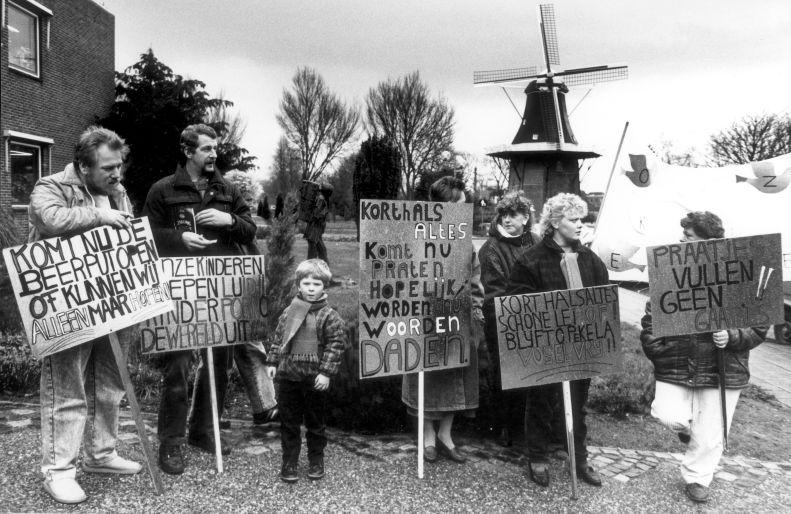 Ontuchtschandaal Oude Pekela: betrokken ouders met spandoeken wachten minister Korthals Altes op, in afwachting van het bezoek dat de minister aan het dorp brengt om met de betrokken partijen te spreken. 4 februari 1988.